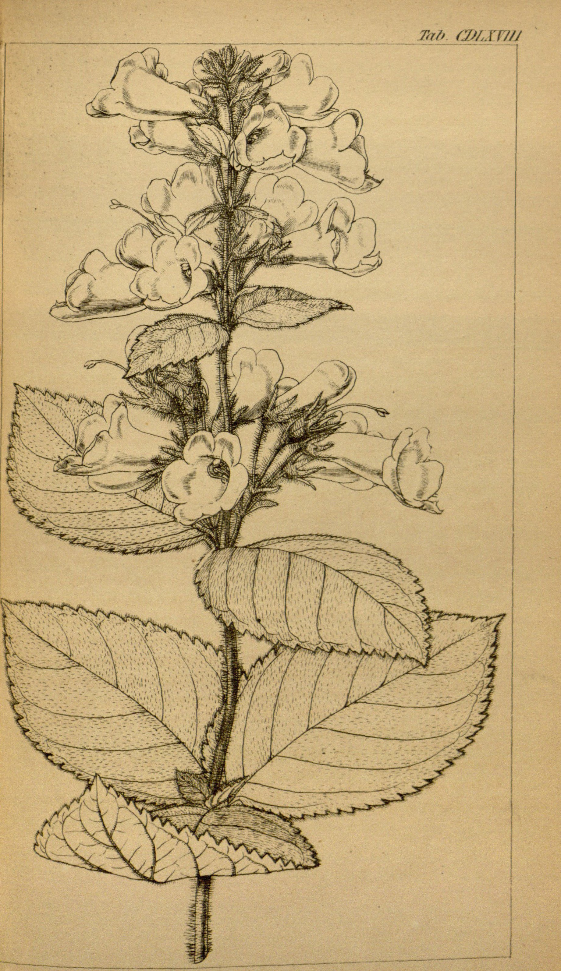 Mandirola multiflora